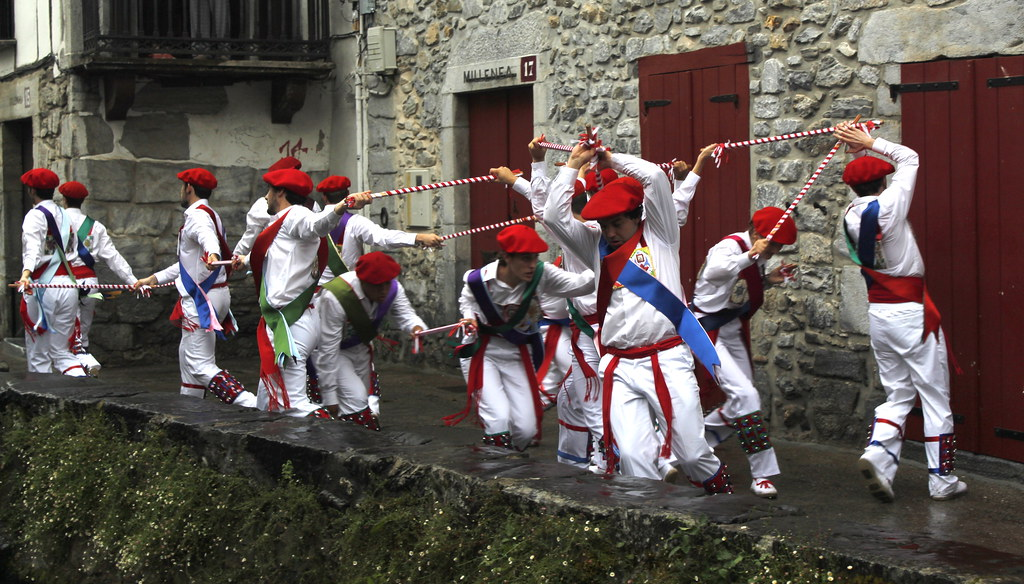 Lesakako ezpatadantzariak makil gurutzeak egiten, 2019ko San Fermin egunean.